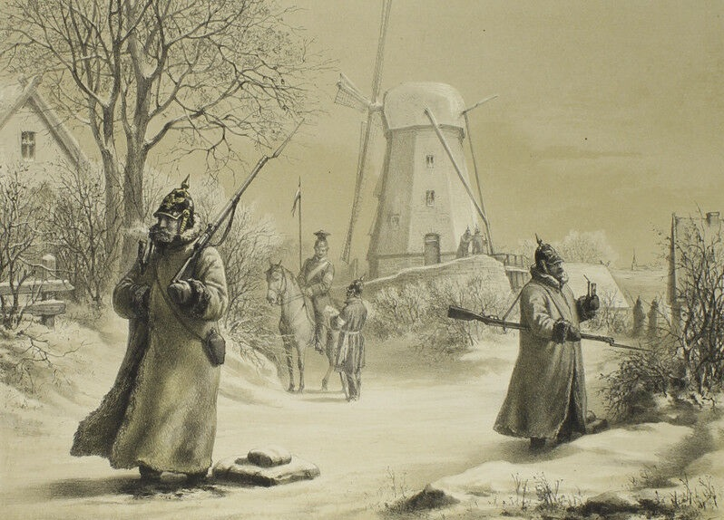 Vorposten bei der Mühle von Nübbel